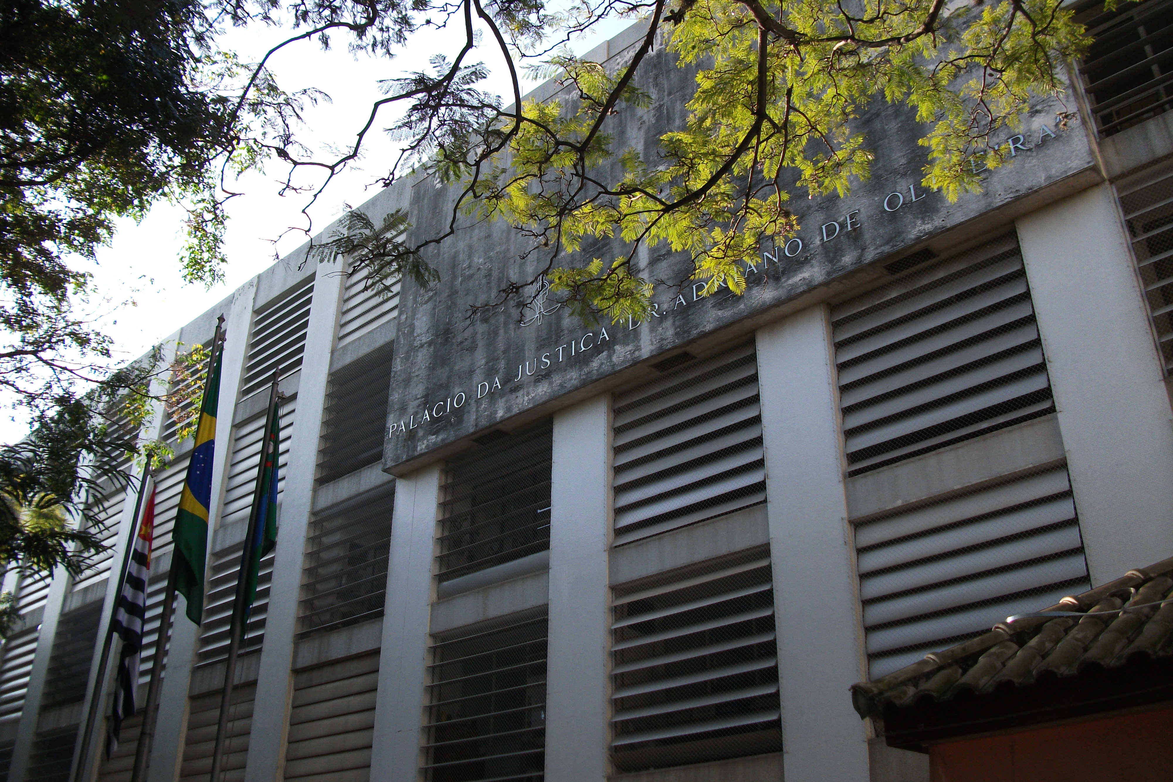 Forum de Jundiaí.